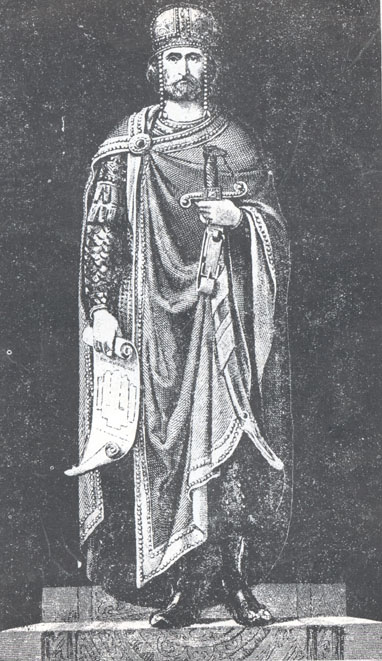 Bild von David dem Erbauer in Public Domain. Darstellung aus dem 19. Jahrhundert ja und,....